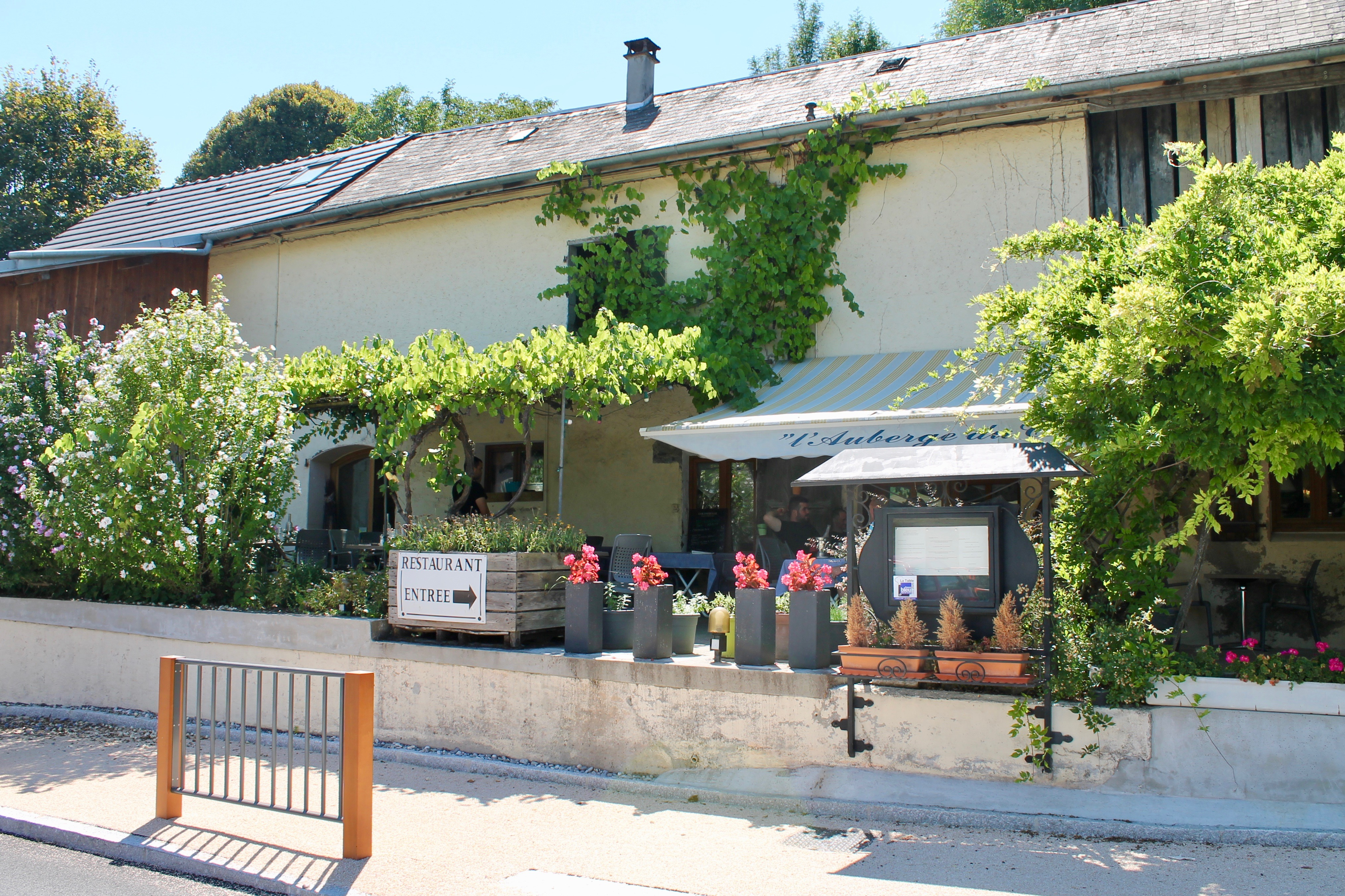 Façade du restaurant Par Monts et par Vaulx, situé au chef-lieu de Vaulx (Haute-Savoie).